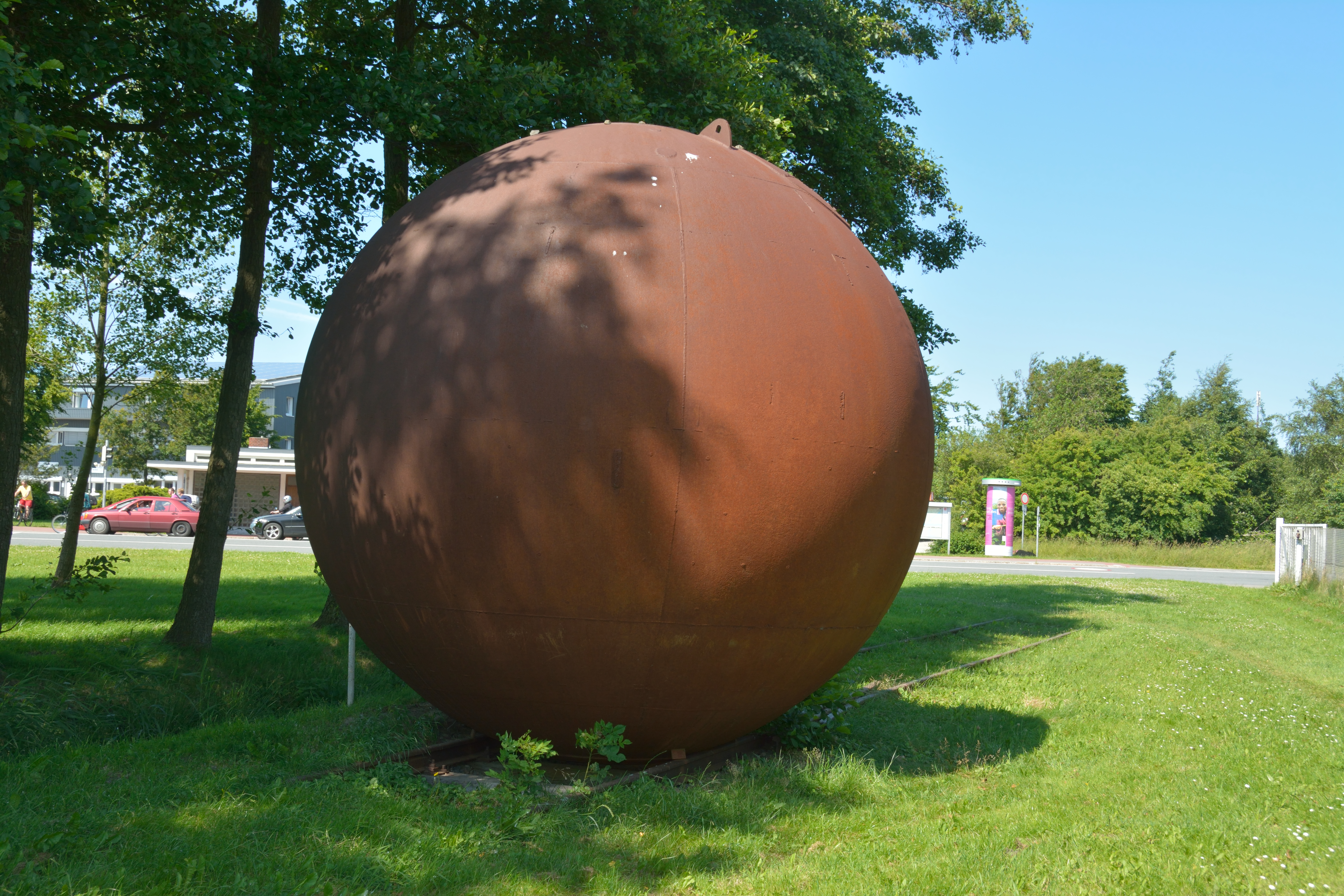 Ein Kunstobjekt von Diethelm Koch in Brunsbüttel [1]